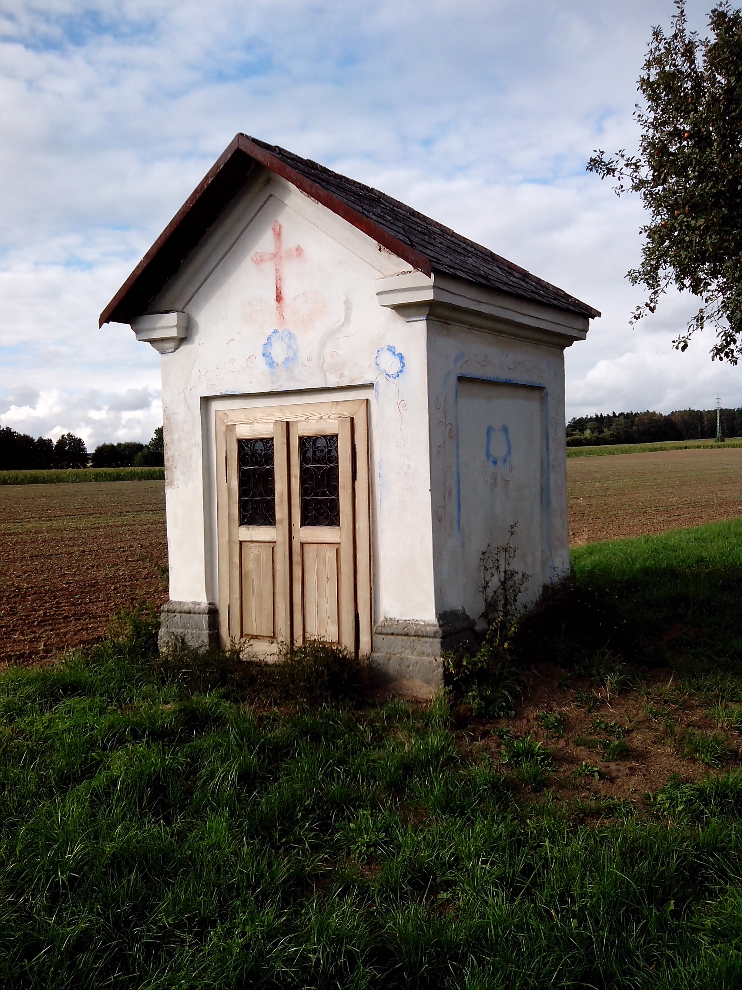 Dubenec - kaple Bolestivé matky Boží